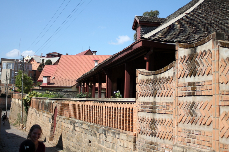 Antananarivo september 2015